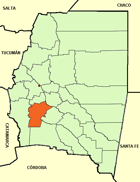 Mapa editado de: Santiago del Estero province (Argentina), departments and capital.png